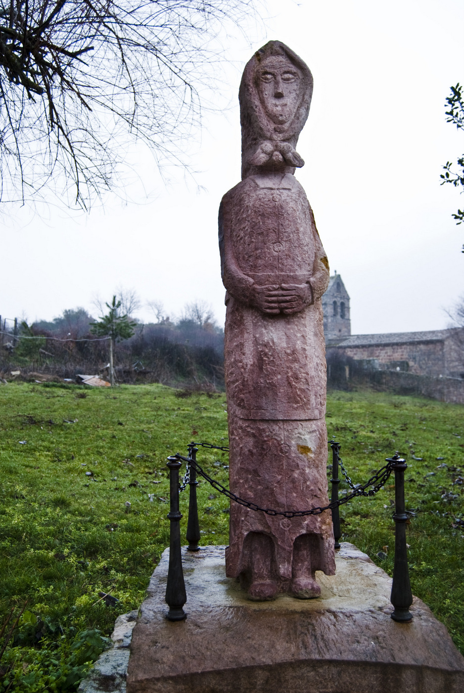 Homenaje a la Mujer Rural. Pueblo de Monasterio (Palencia)